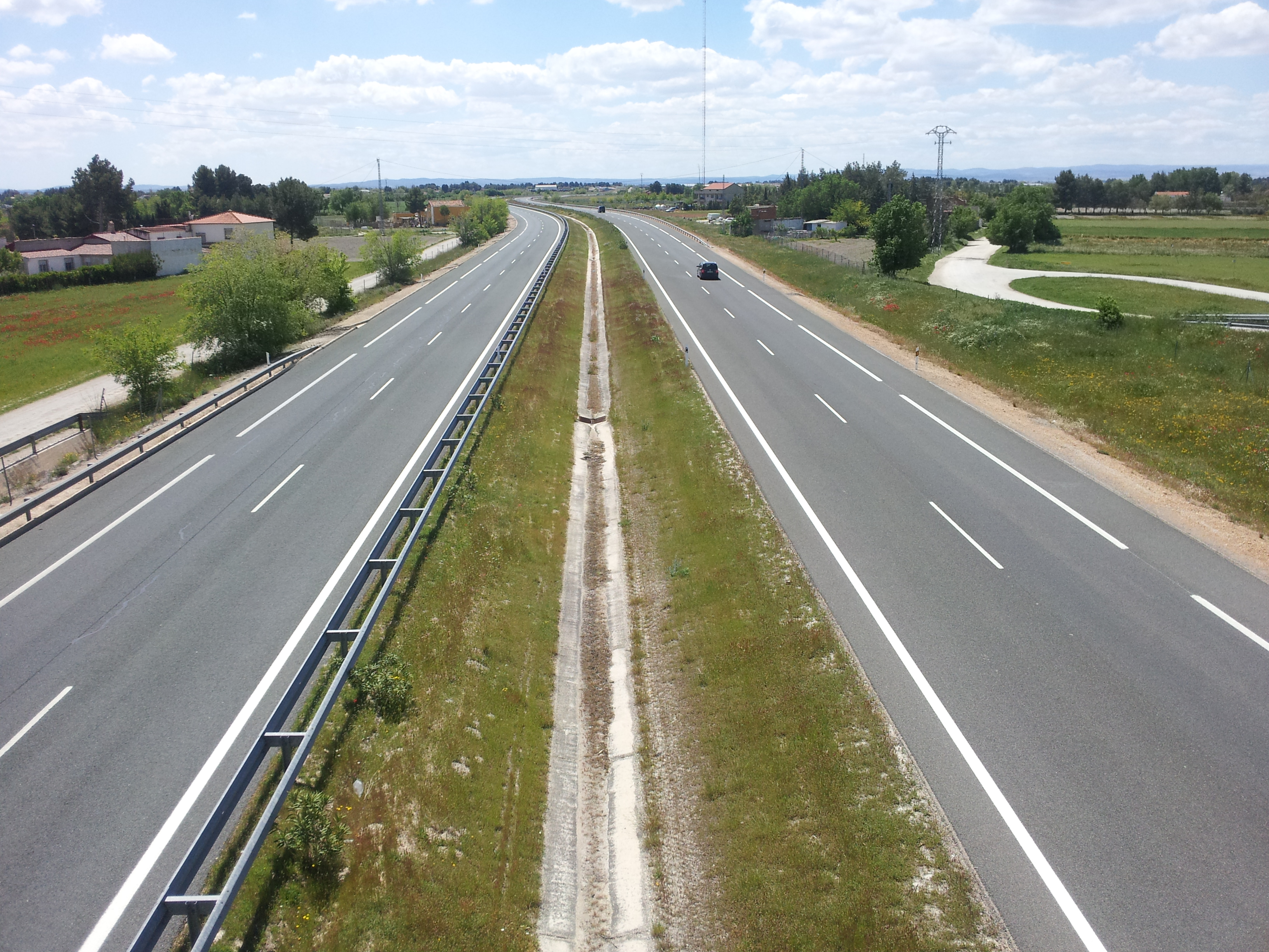 Autovía A-32 a su paso por Albacete.